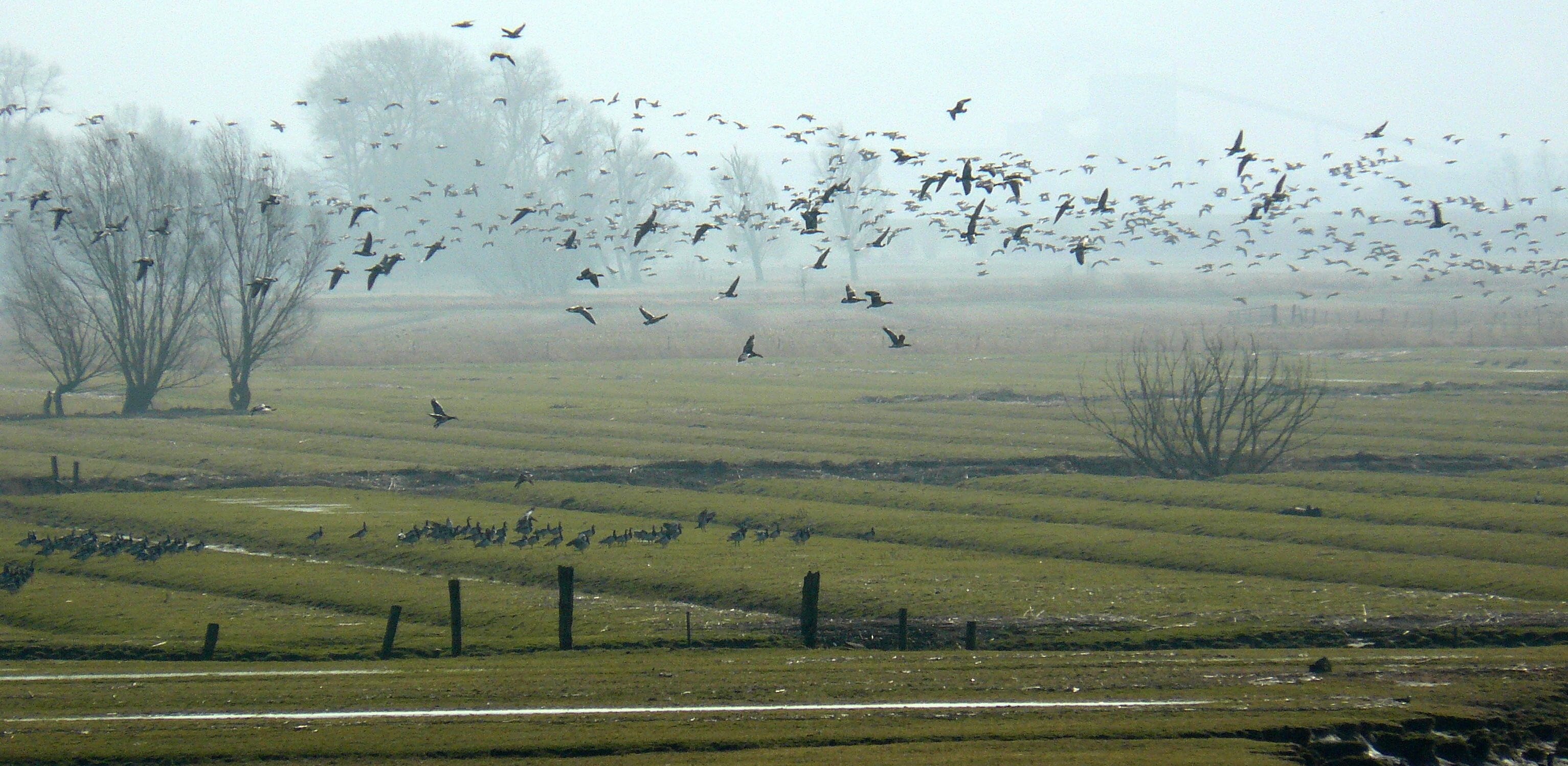 Rastende Nonnengänse/Weißwangengänse (Branta leucopsis) im Naturschutzgebiet und EU-Vogelschutzgebiet „Asselersand“, Landkreis Stade, Niedersachsen